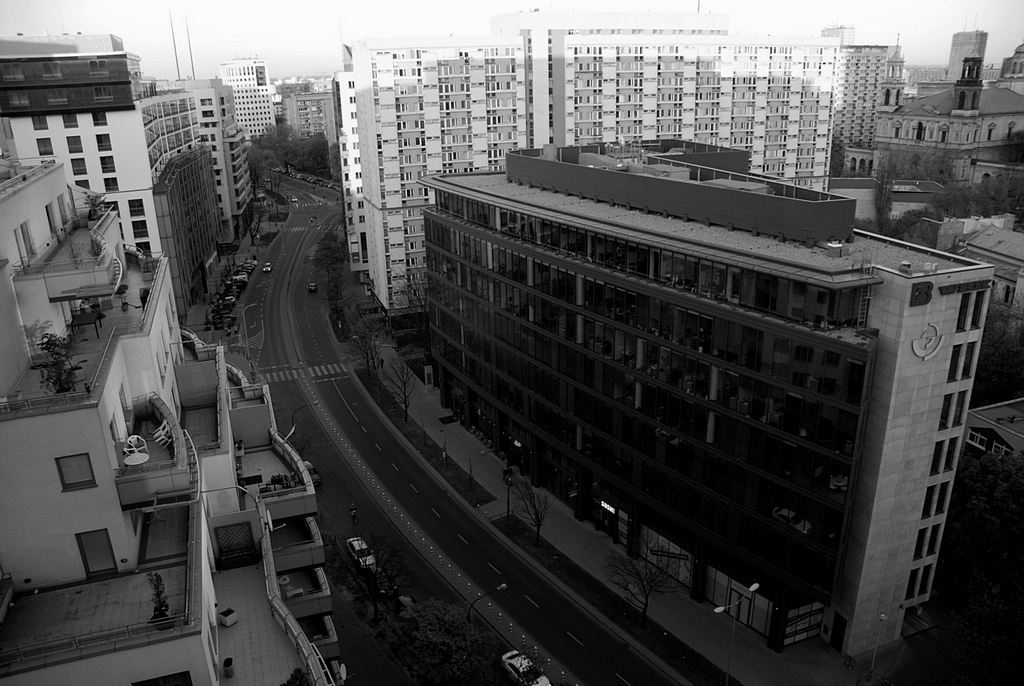 Grzybowska in Warsaw